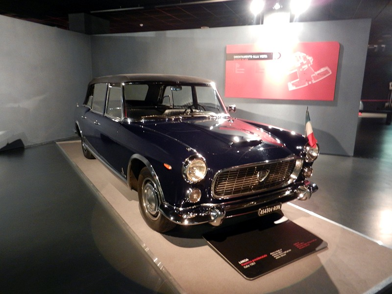 Torino - Lancia Flaminia 335 presidenziale del 1961 in mostra al Museo dell'Automobile